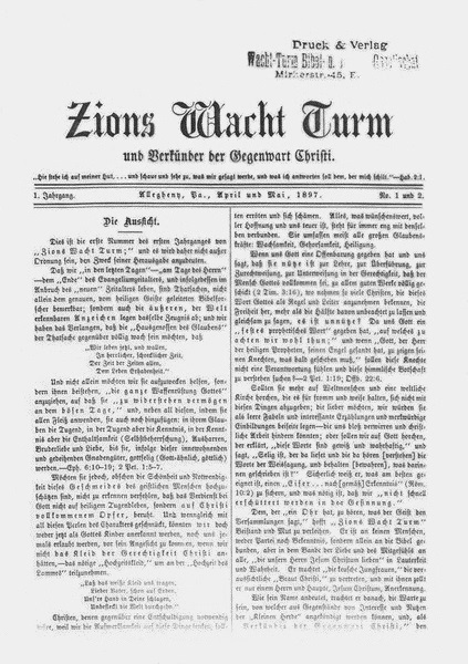 Pierwszy numer czasopisma Strażnica w języku niemieckim (kwiecień-maj 1897)